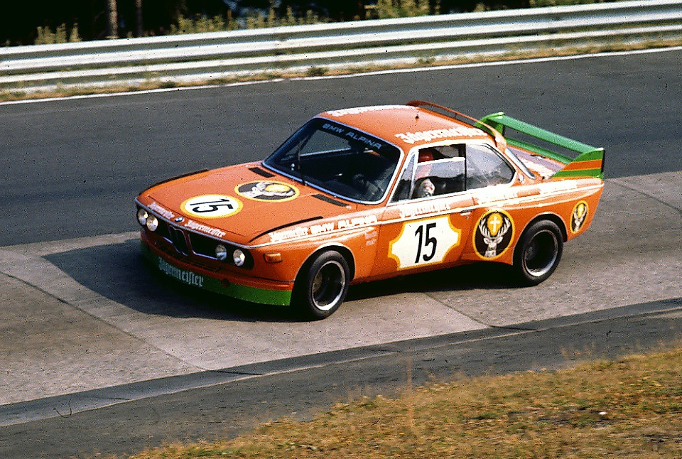 Niki Lauda im Jägermeister-BMW CLS beim 6-Stunden-Rennen auf dem Nürburgring 1973 im Karussell)